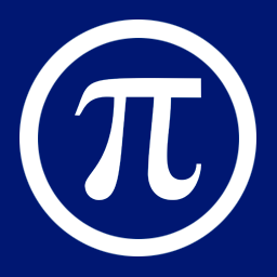 logotipo del programa informático Pineboo